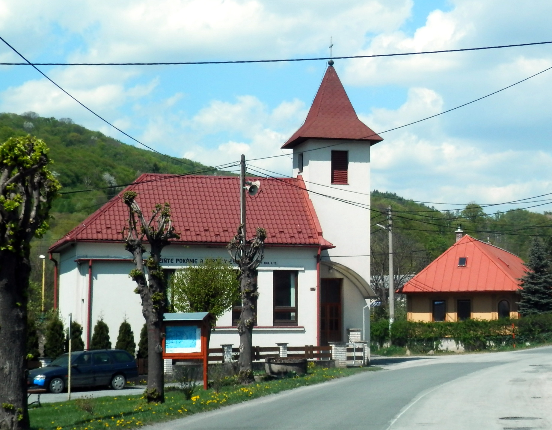 Kostol v obci Trebejov, okres Košice okolie.